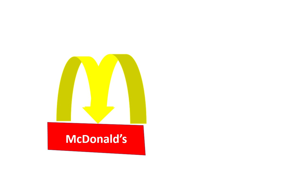 McDonald's Strategic competitiveness